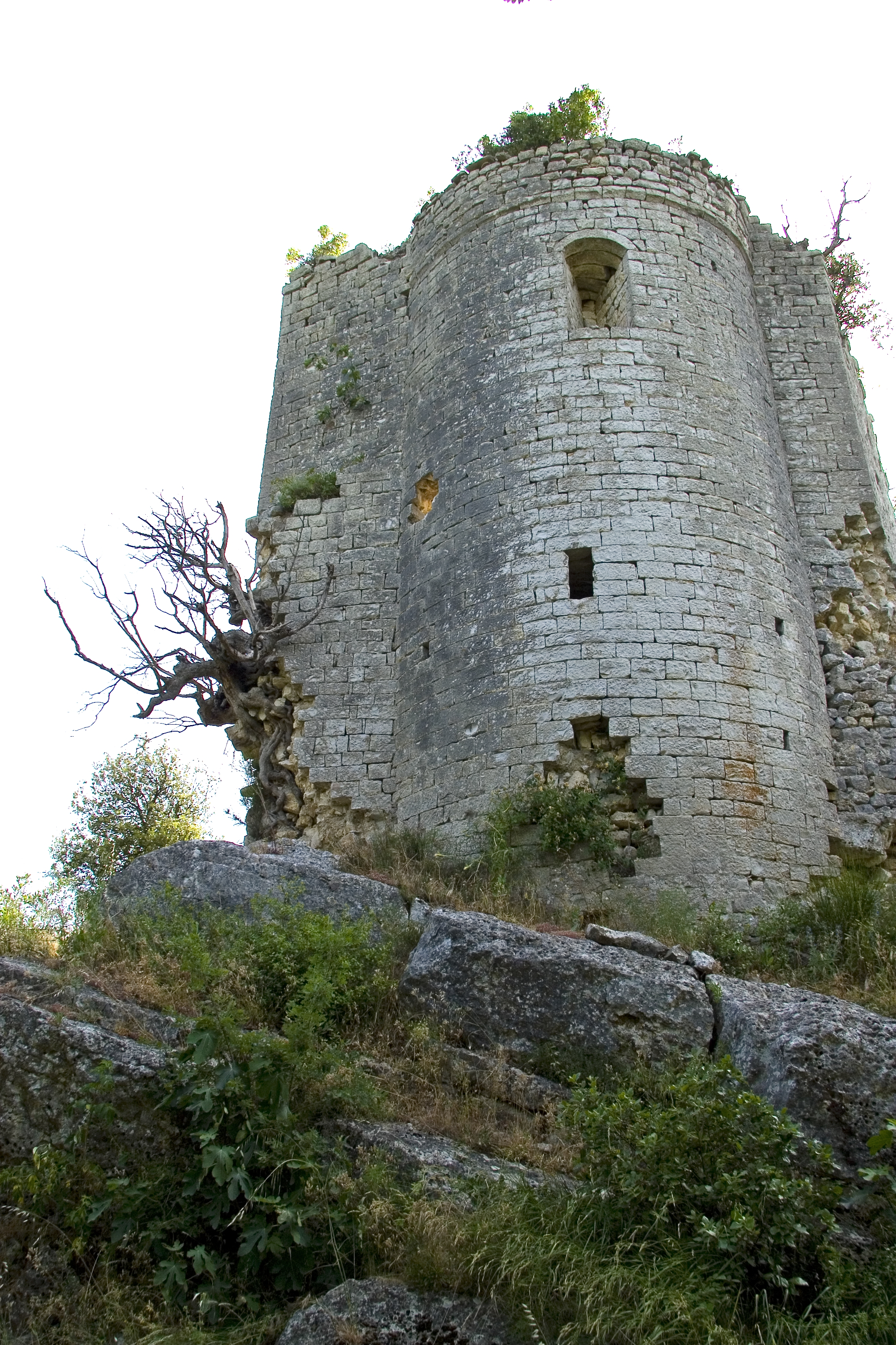 Carnano - Abside della chiesa di Santa Maria all'interno del castello